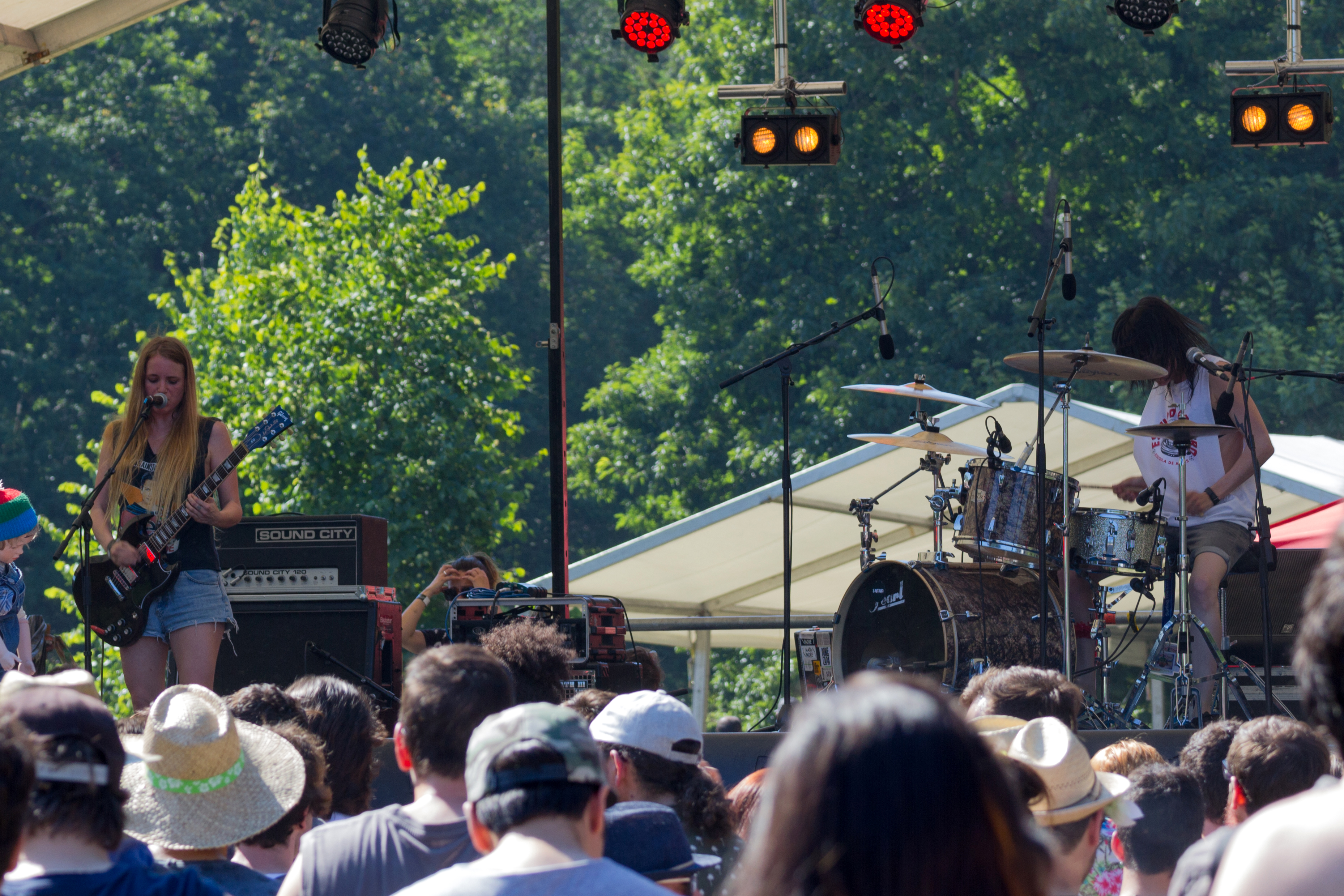 A banda galega Bala no Surfing the Lerez Festival de Pontevedra en 2017.